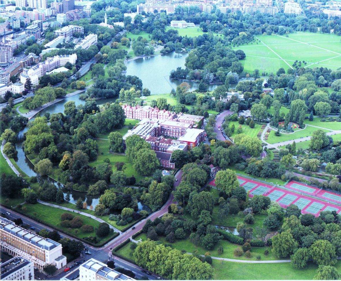 Regent's College and Regent's Park